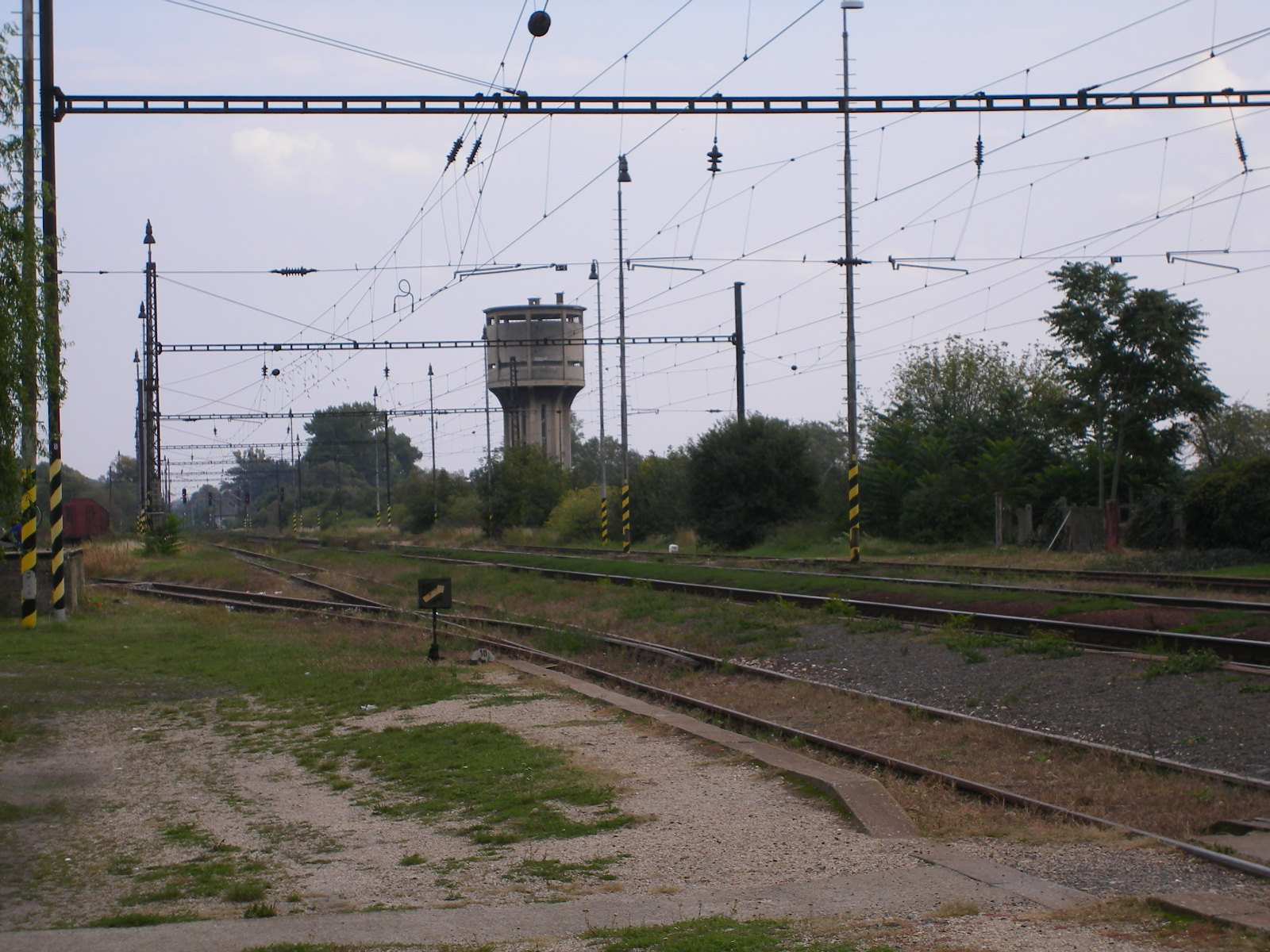 Perbete - vasútállomás